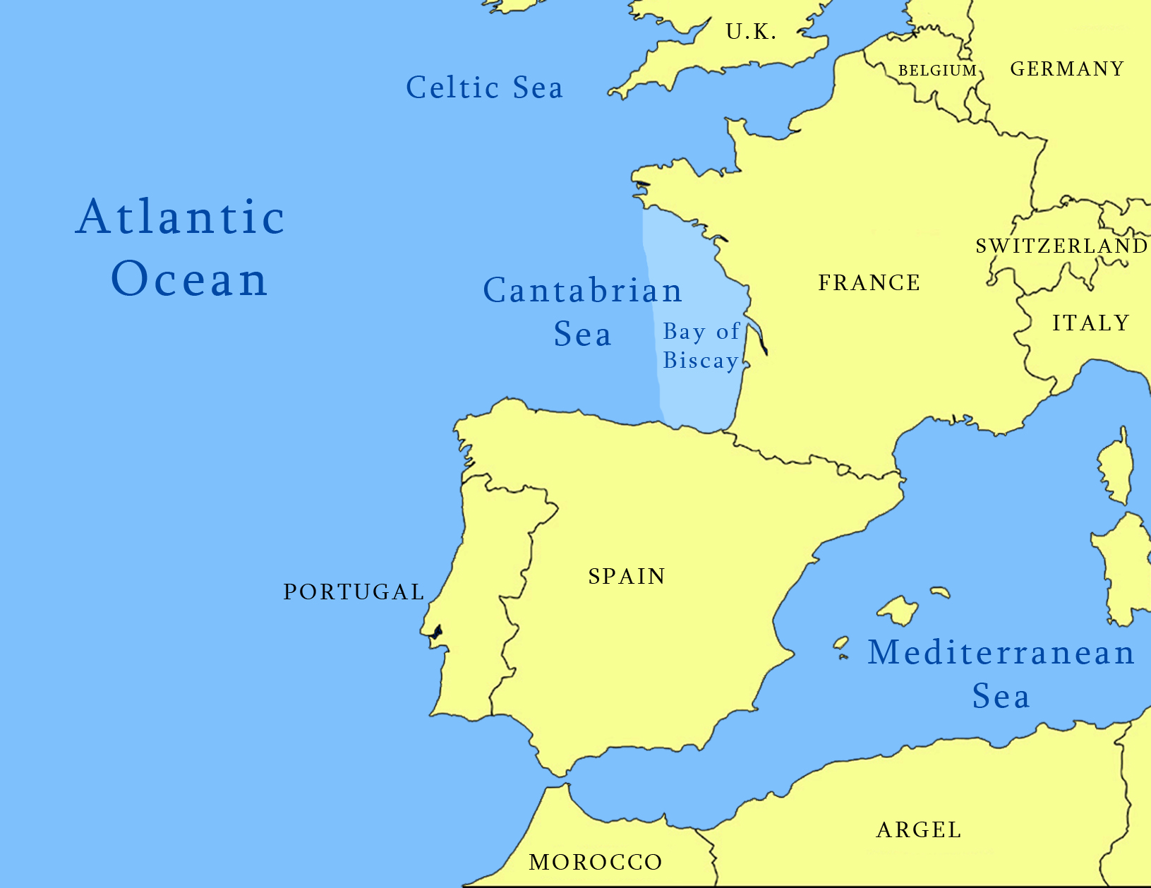 El Mar Cantábrico y situación del Golfo de Vizcaya en el mismo.